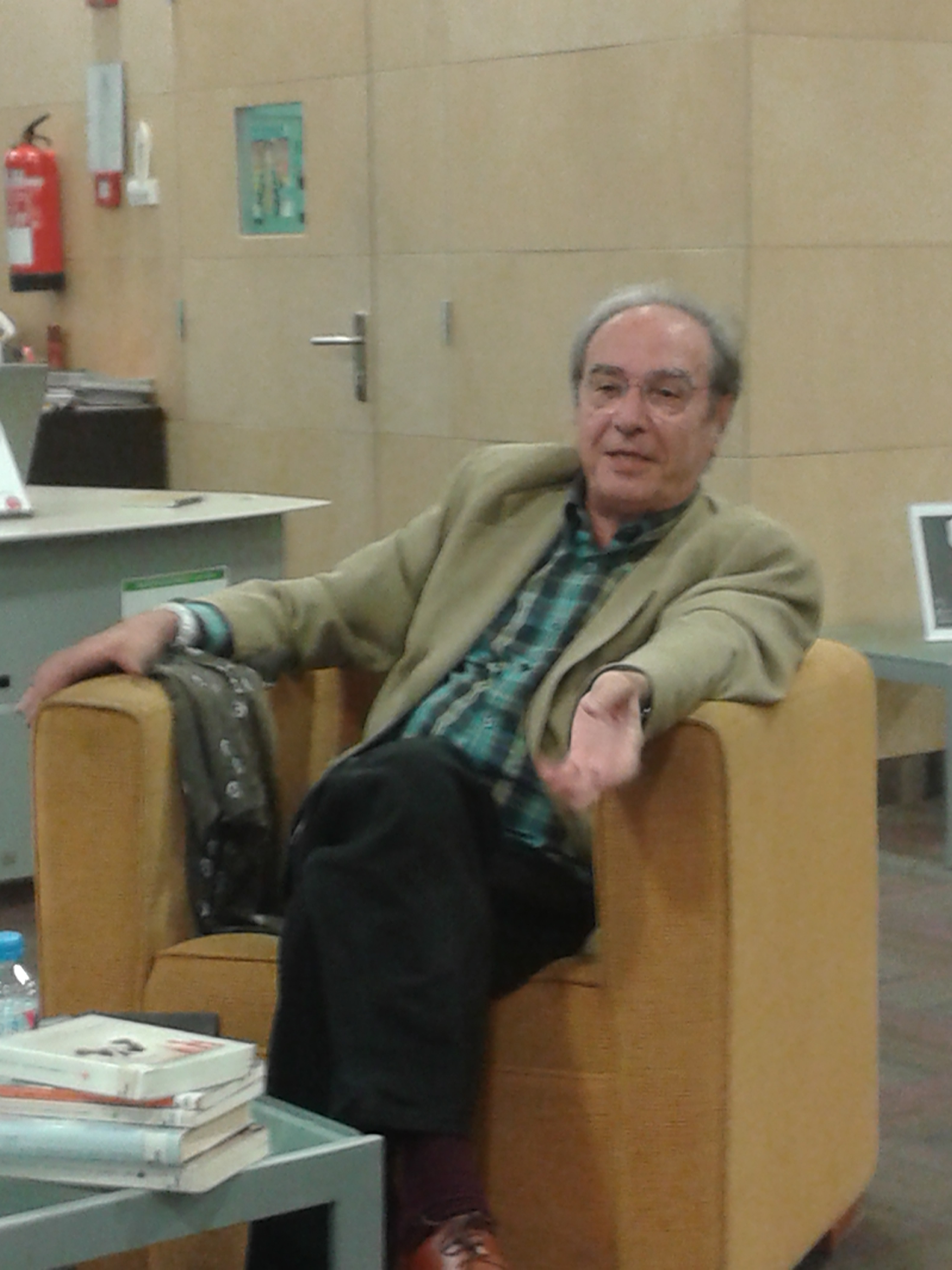 Julià de Jòdar en un col·loqui a Salt el 2014